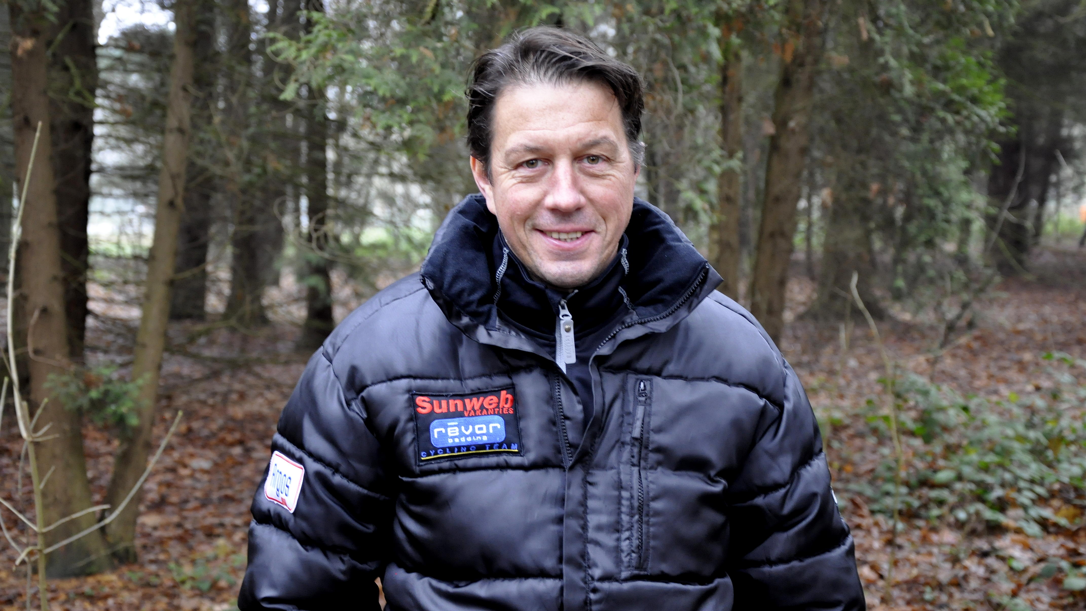 Mario De Clercq tijdens de Cyclocross van het Waasland